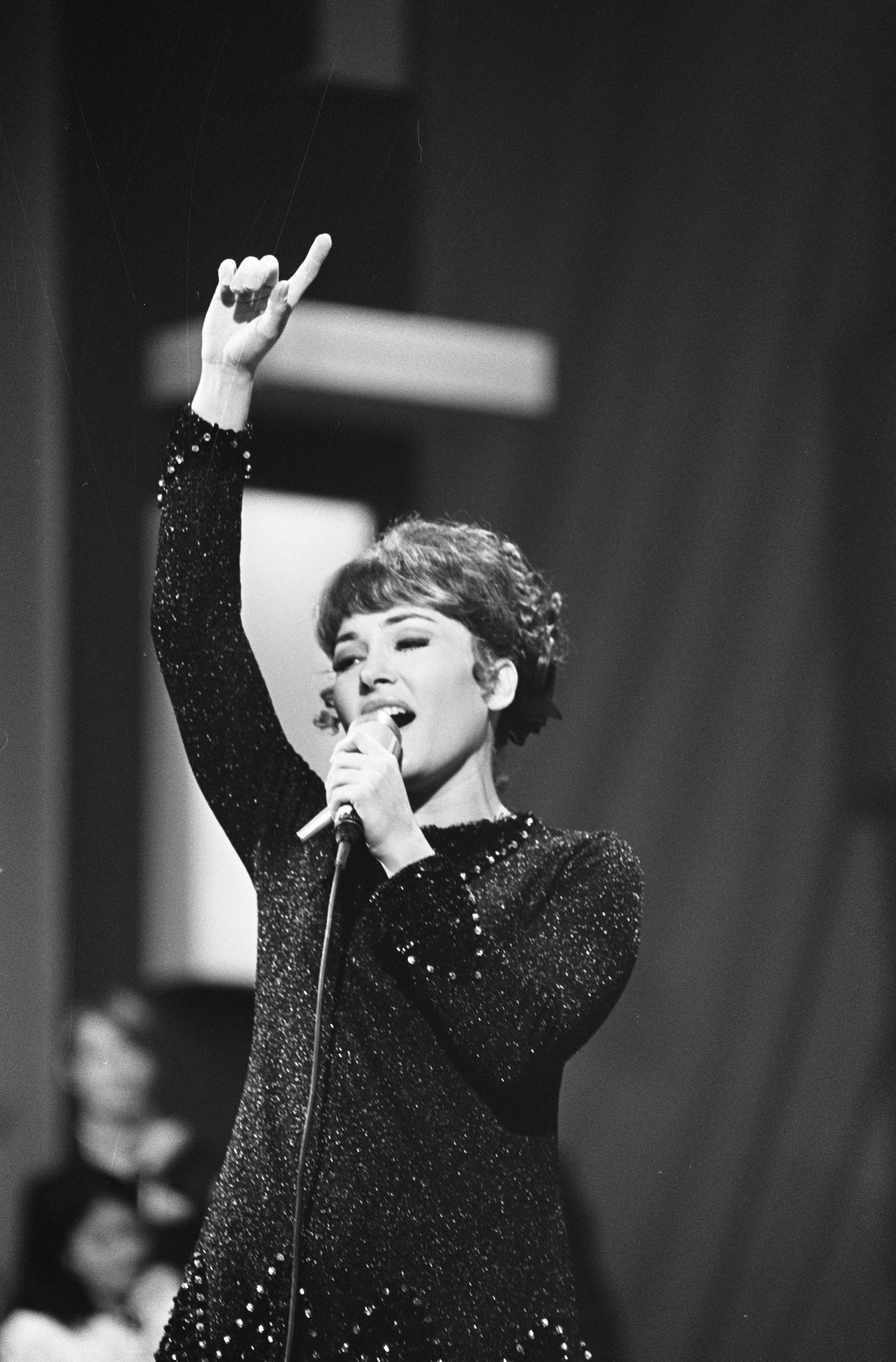 Collectie / Archief : Fotocollectie Anefo Reportage / Serie : Grand Gala du Disque Populaire in Congrescentrum Beschrijving : Rika Zarai Datum : 7 maart 1969 Trefwoorden : muziek, zangeressen Persoonsnaam : Zarai, Rika Fotograaf : Fotograaf Onbekend / Anefo Auteursrechthebbende : Nationaal Archief Materiaalsoort : Negatief (zwart/wit) Nummer archiefinventaris : bekijk toegang 2.24.01.05 Bestanddeelnummer : 922-1812